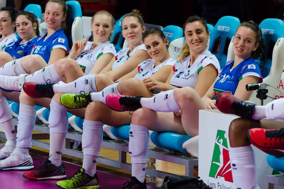 Vedi titolo